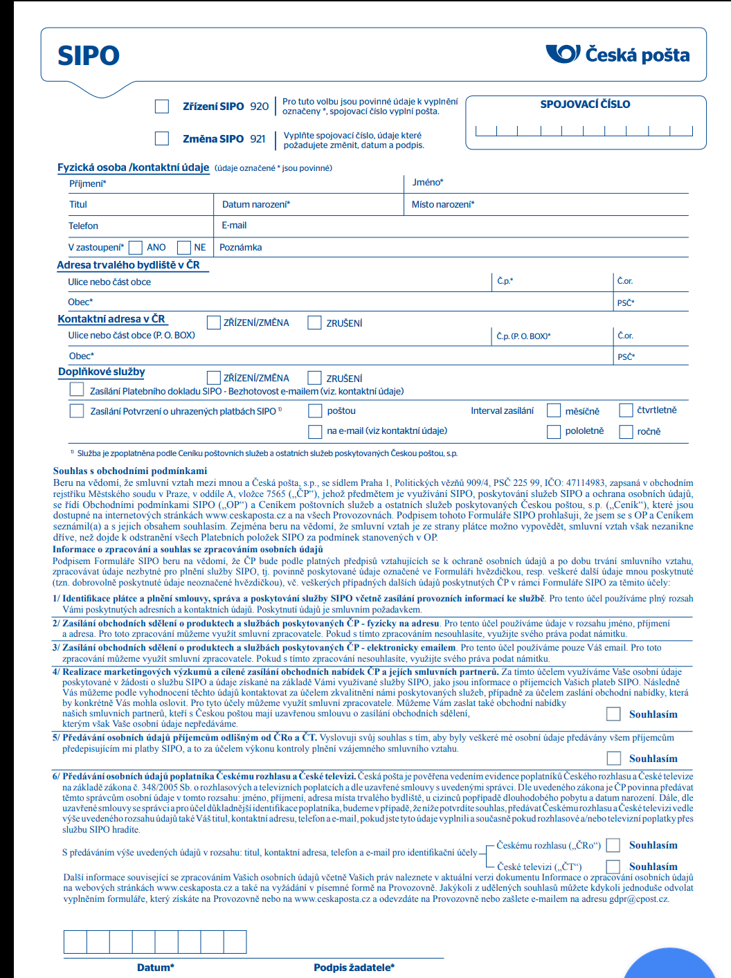 screenshot